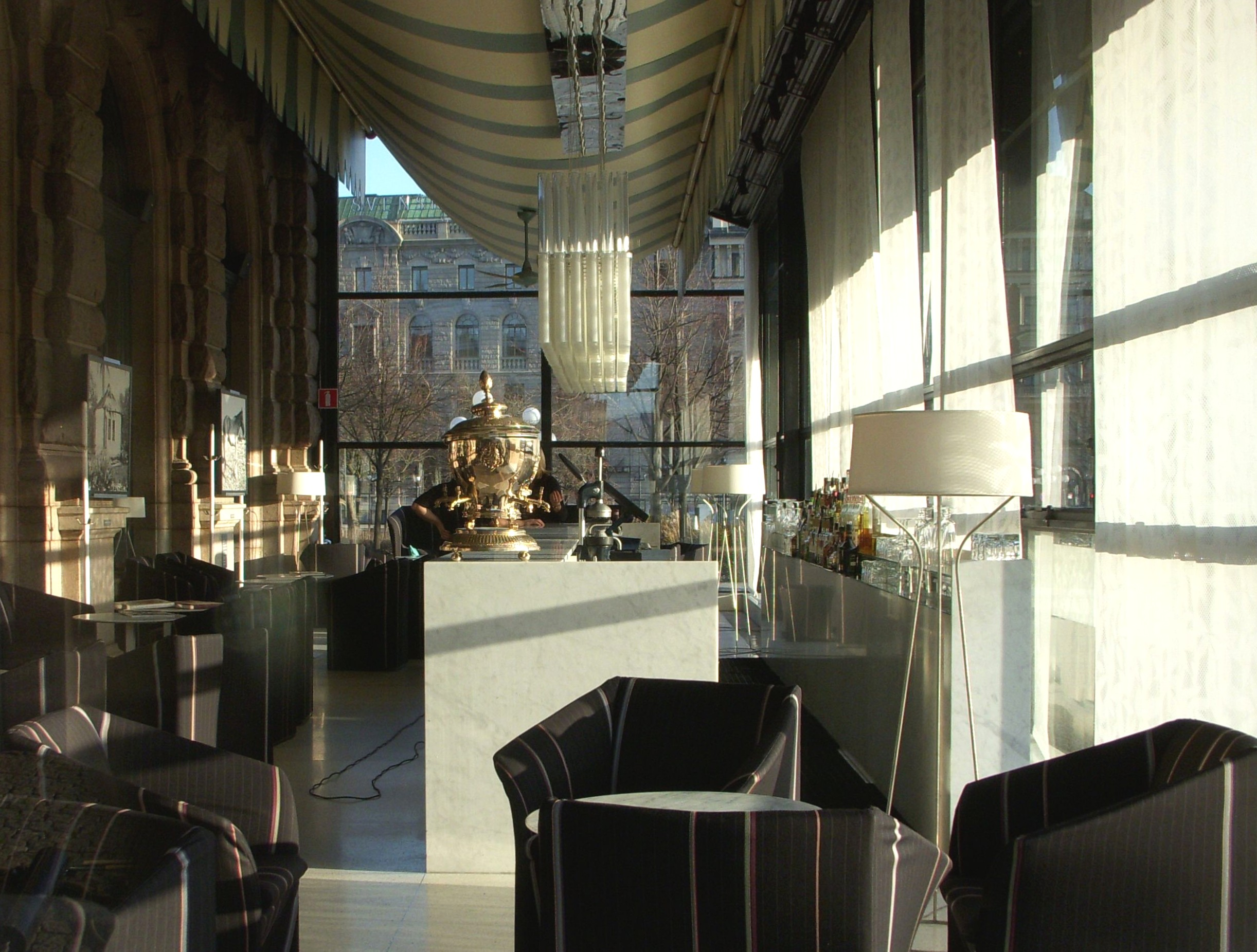 Operakällaren i Stockholm